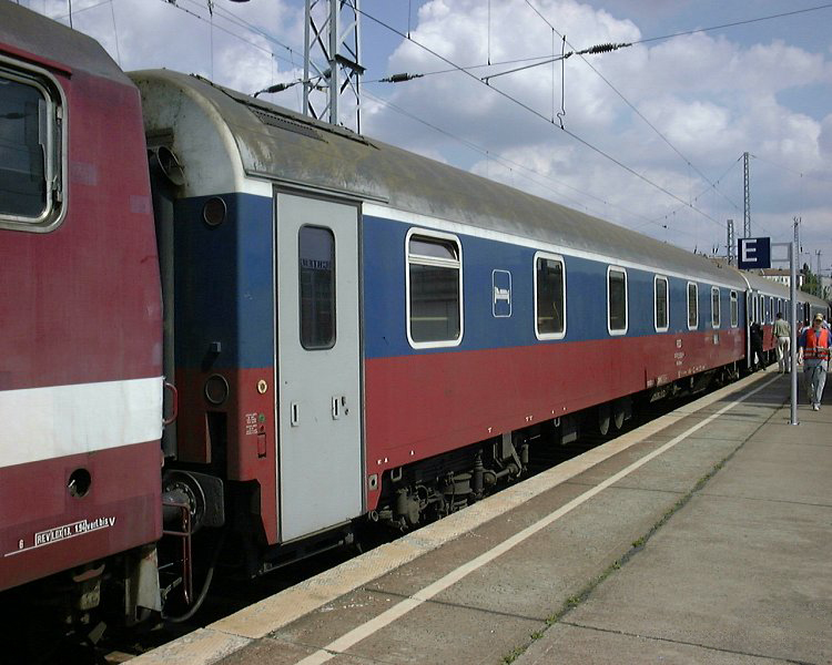 Russischer Schlafwagen typ WLABmee in Berlin-Lichtenberg, 2000-08-05. Photo: tobias b köhler